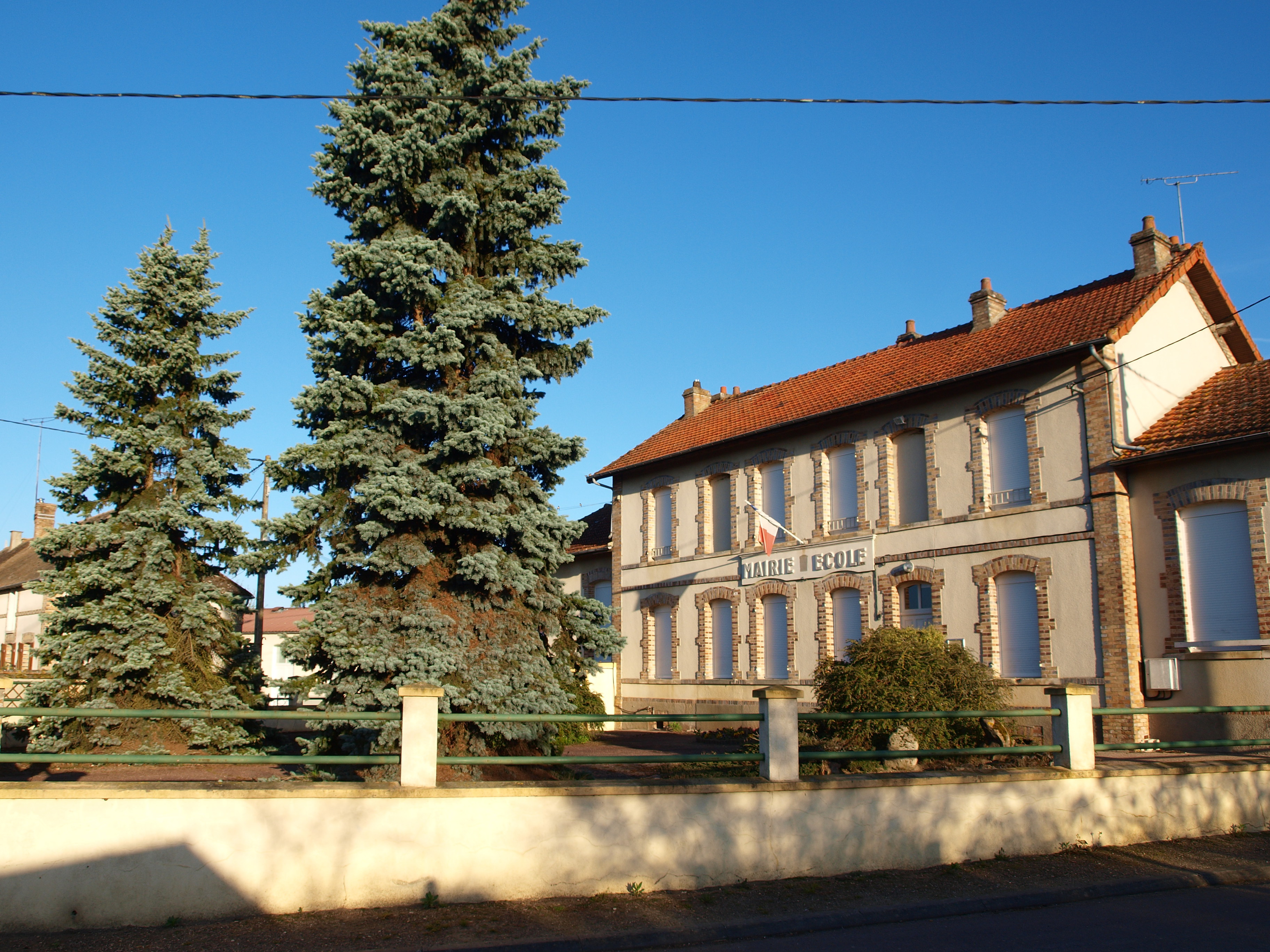 Villebougis (Yonne, France)